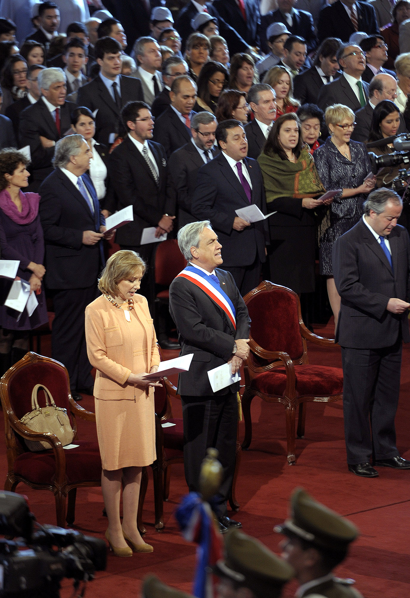 16-09-2012 Te Deum Evangélico